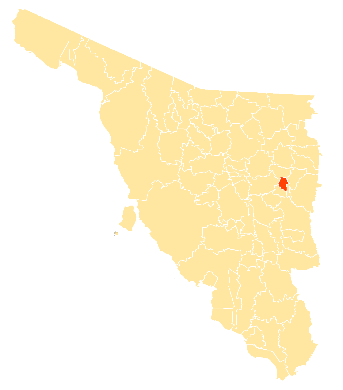 Municipio dentro de Sonora, México.